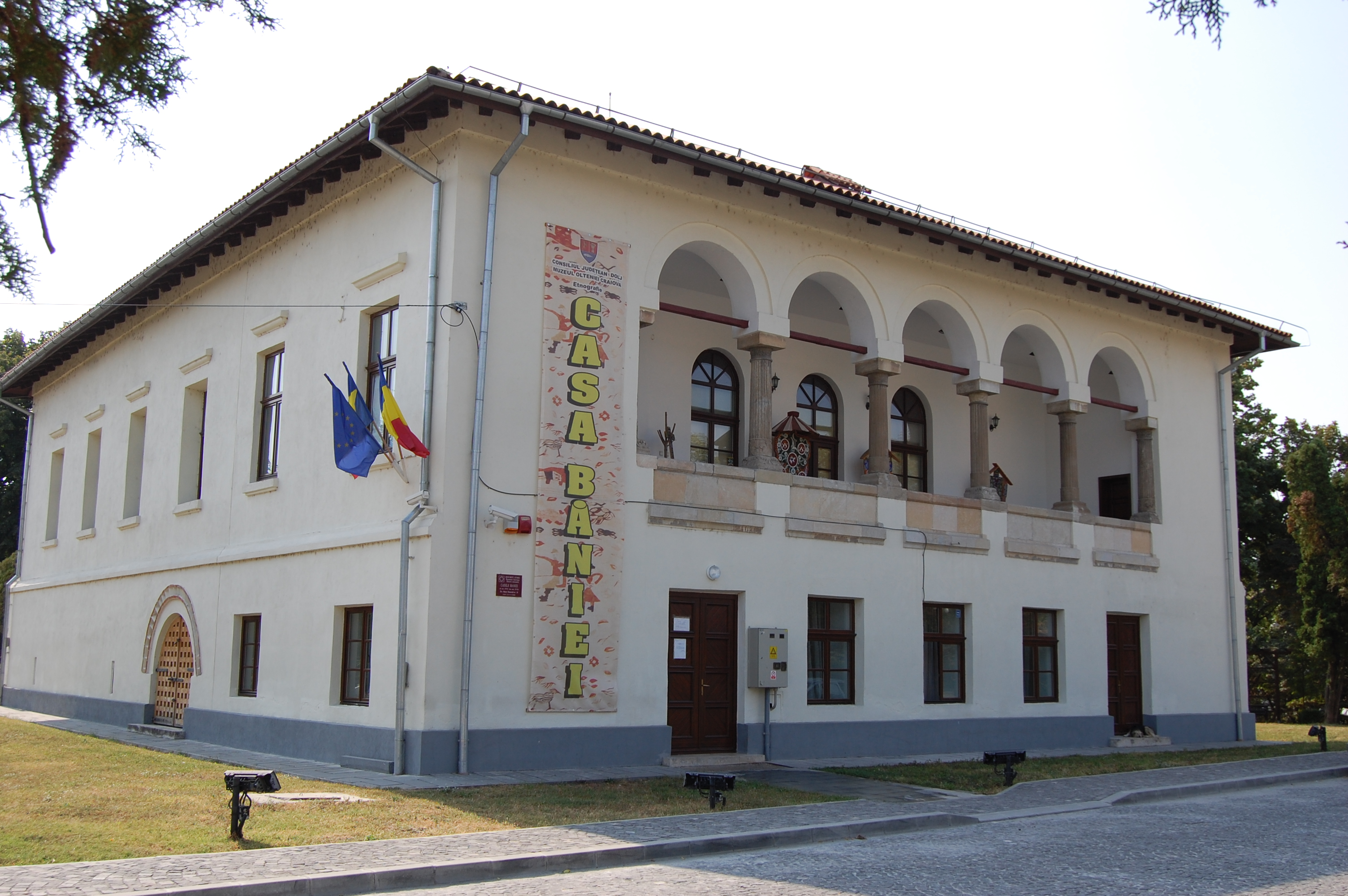 Baniei House, Craiova